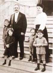 O governador radical da província de Santa Fe Manuel Menchaca con su familia. Eleito nas eleições de 1912, as primeiras sob a Lei Saenz Peña . Fonte: Archivo General de la Nación Argentina. Esta imagem é de domínio público pela Lei nº 11.723 (lei argentina de propriedade intelectual), em seu artigo 34 e suas modificações; todas as obras fotográficas produzidas na Argentina passan ao domínio público após decorridos 25 anos desde a sua primeira publicação.